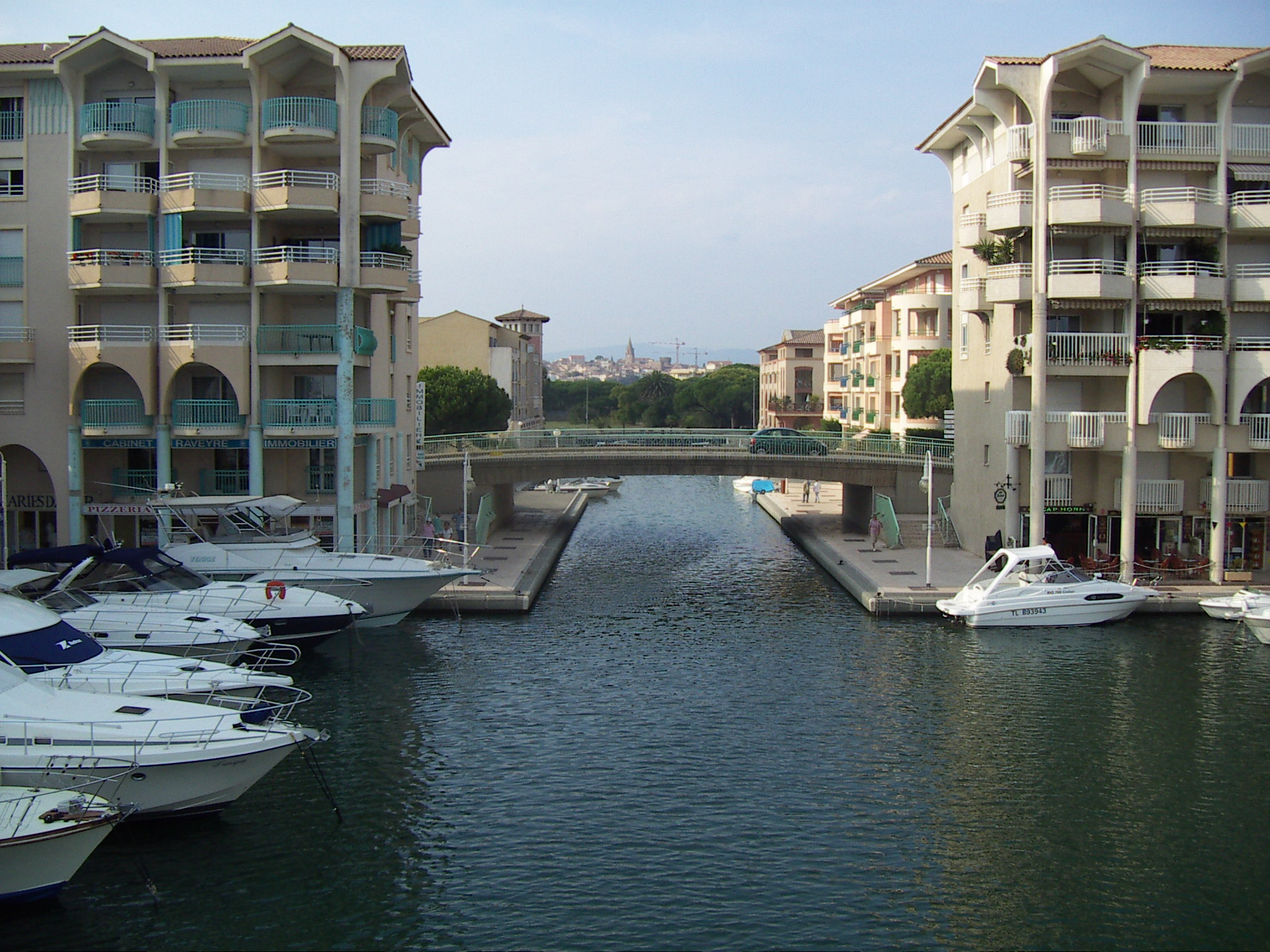 Frejus Port mit Blick auf Frejus-Ville